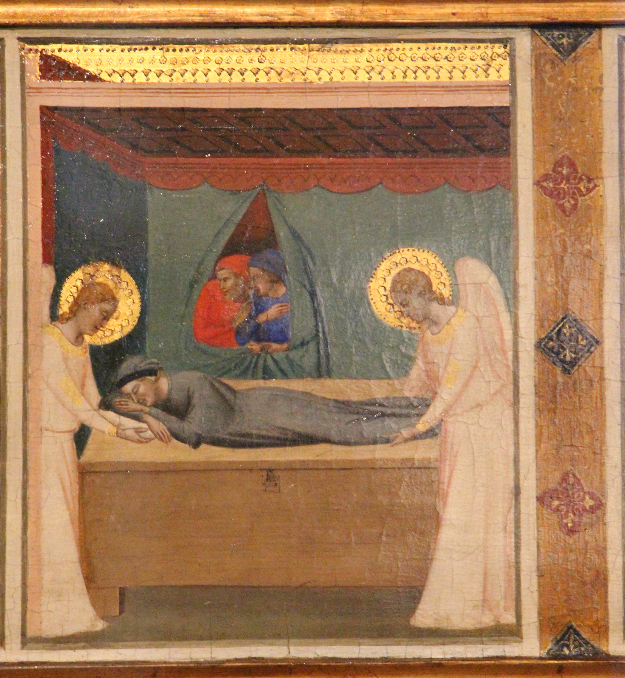 Bernardo Daddi, storie della vera Cintola, 1337-38, da altare maggiore duomo di Prato